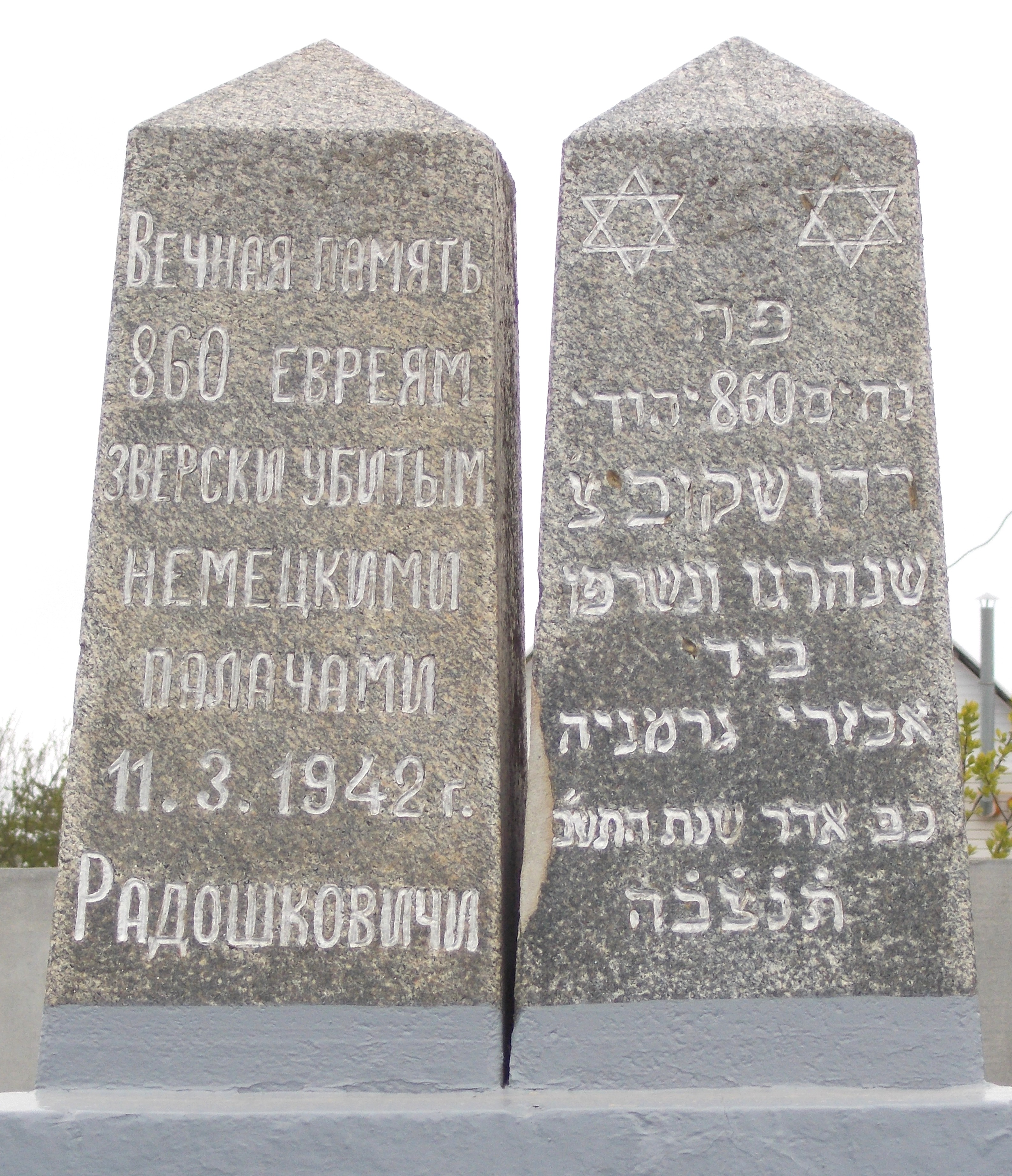 Памятник на месте убийства 860 евреев Радошковичей 11 марта 1942 года. Находится в Радошковичах у пересечения улицы 8 Марта и Полоцкого переулка.